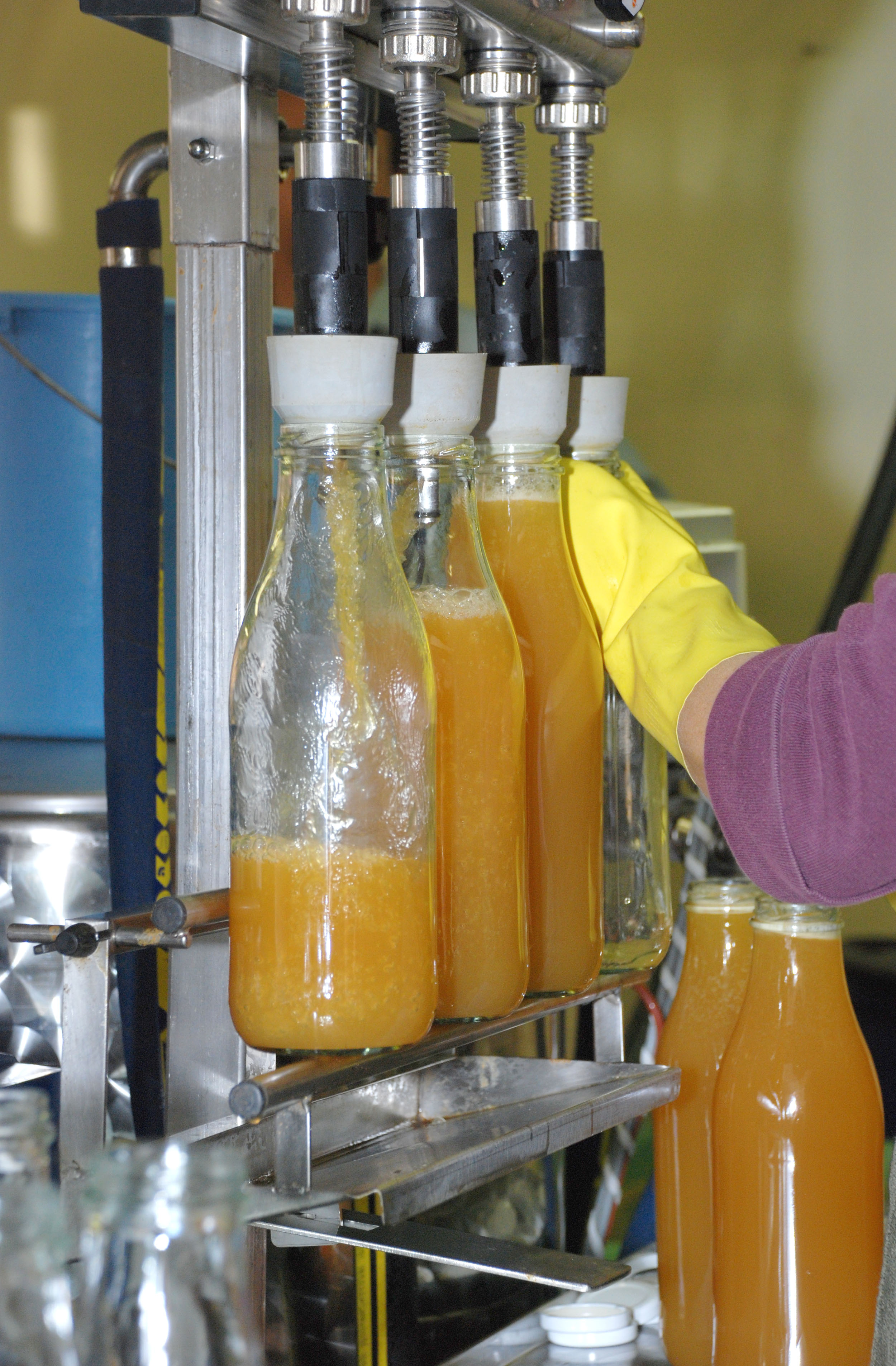 Frisch gepresster Apfelsaft wird abgefüllt